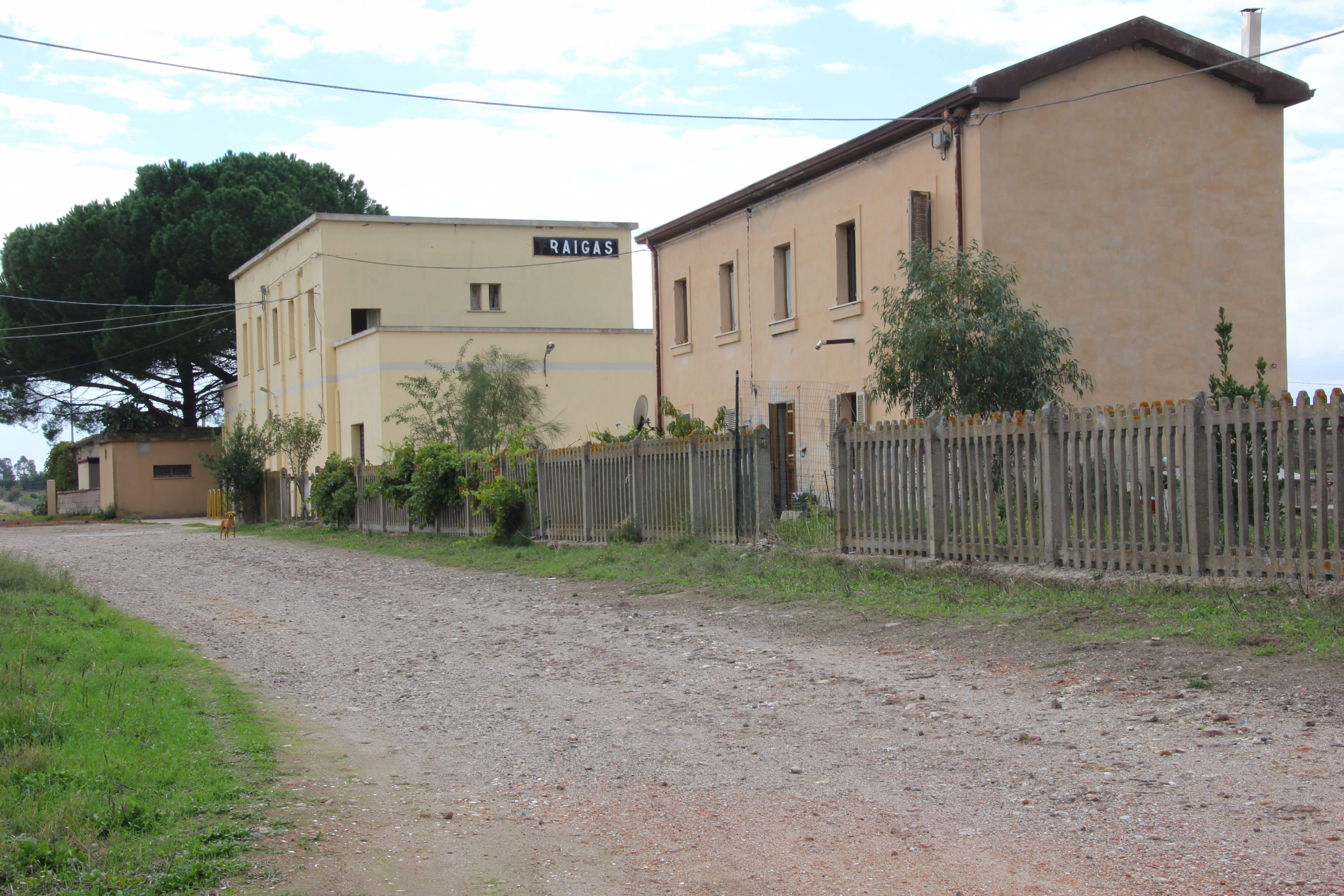 Ozieri - Stazione di Fraigas